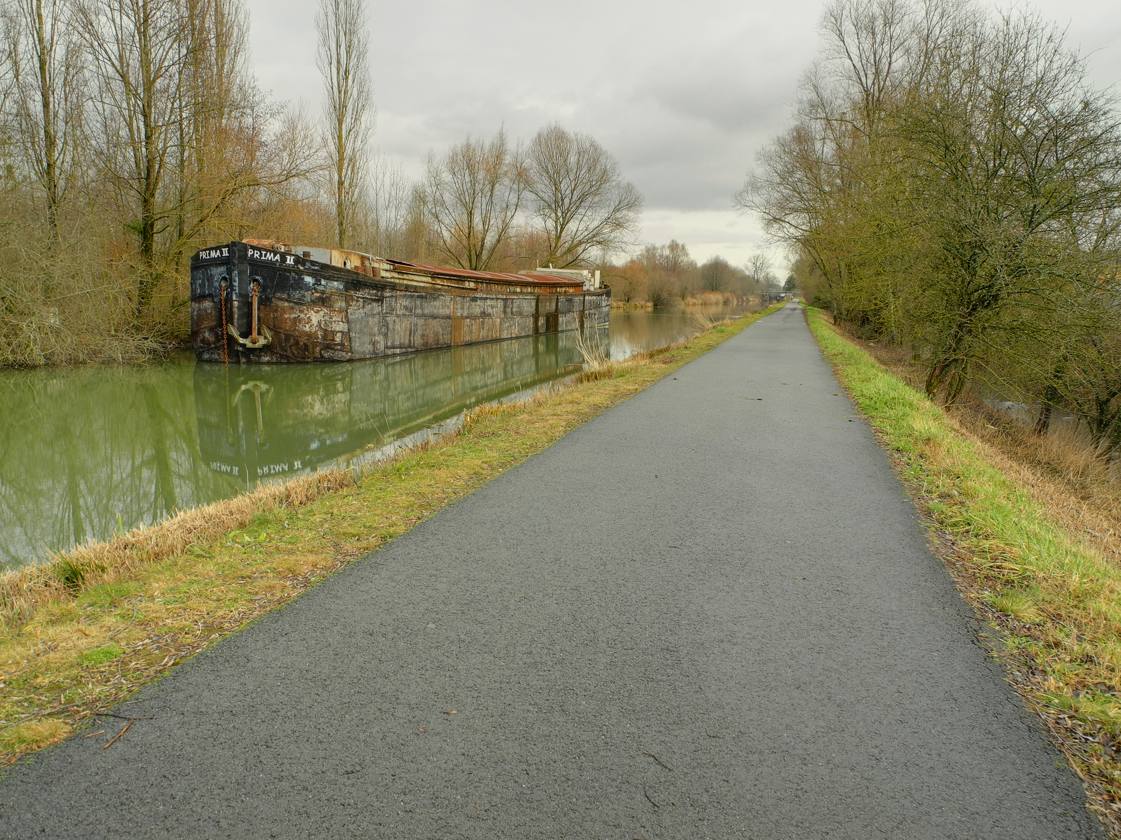 L'EuroVelo 6 à Étupes, avec une péniche à proximité (HDR).